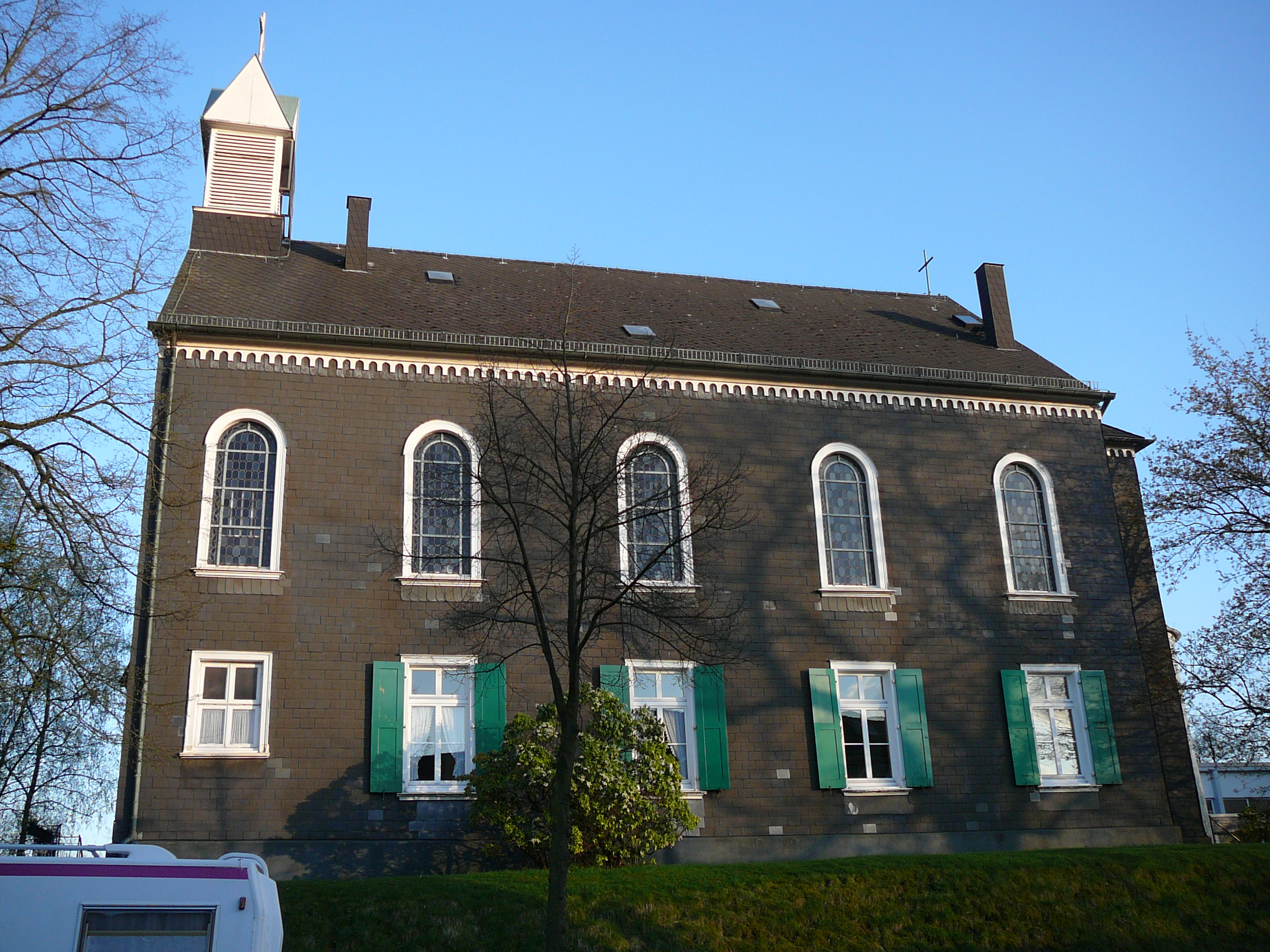 Wittener Straße, Wuppertal